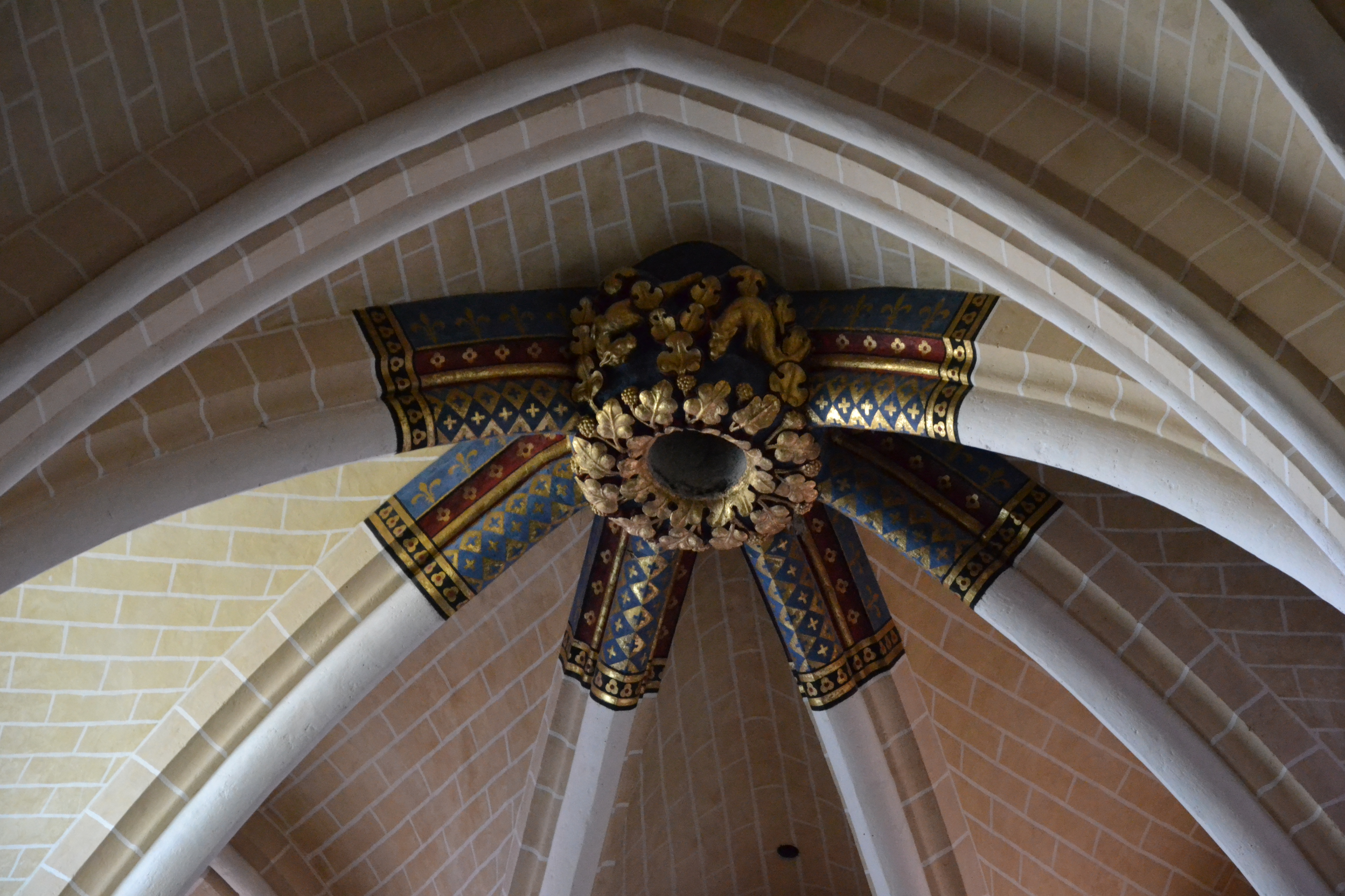 Cathédrale de Chartres (Classé, 1862)